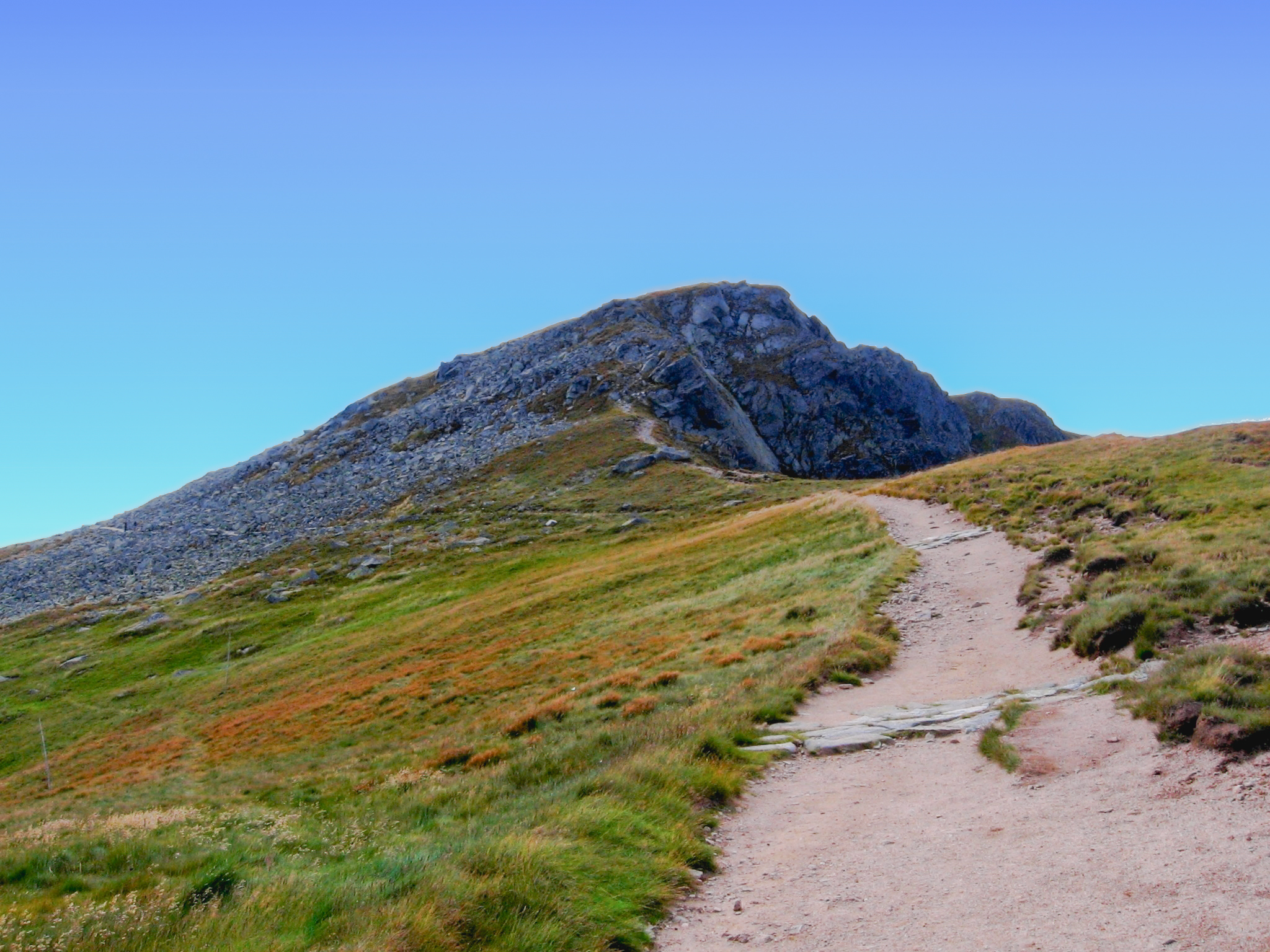 Derese 2004 m.